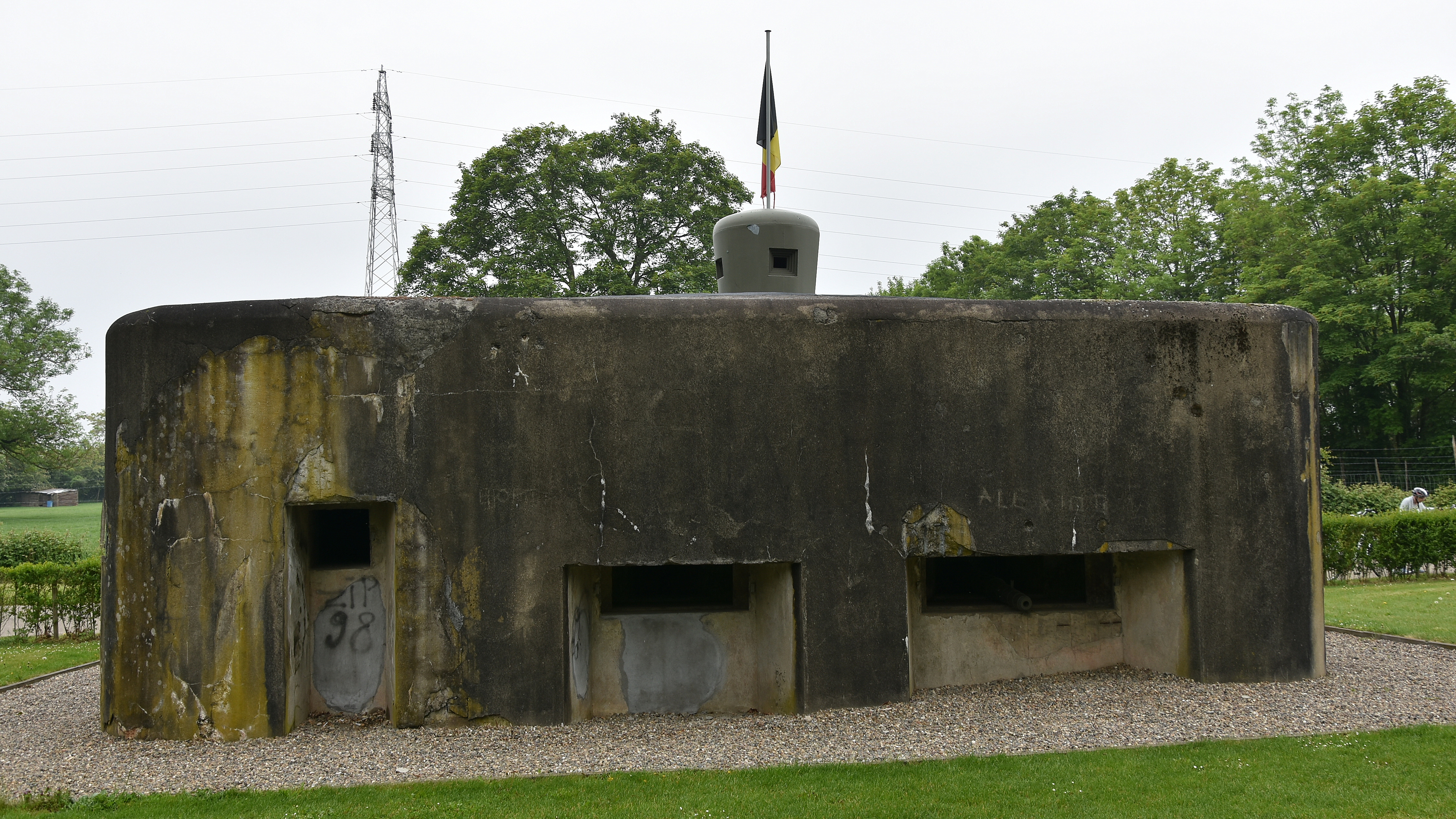 Antitankbunker 11 (216494) Neerharen 18-05-2019 10-20-35